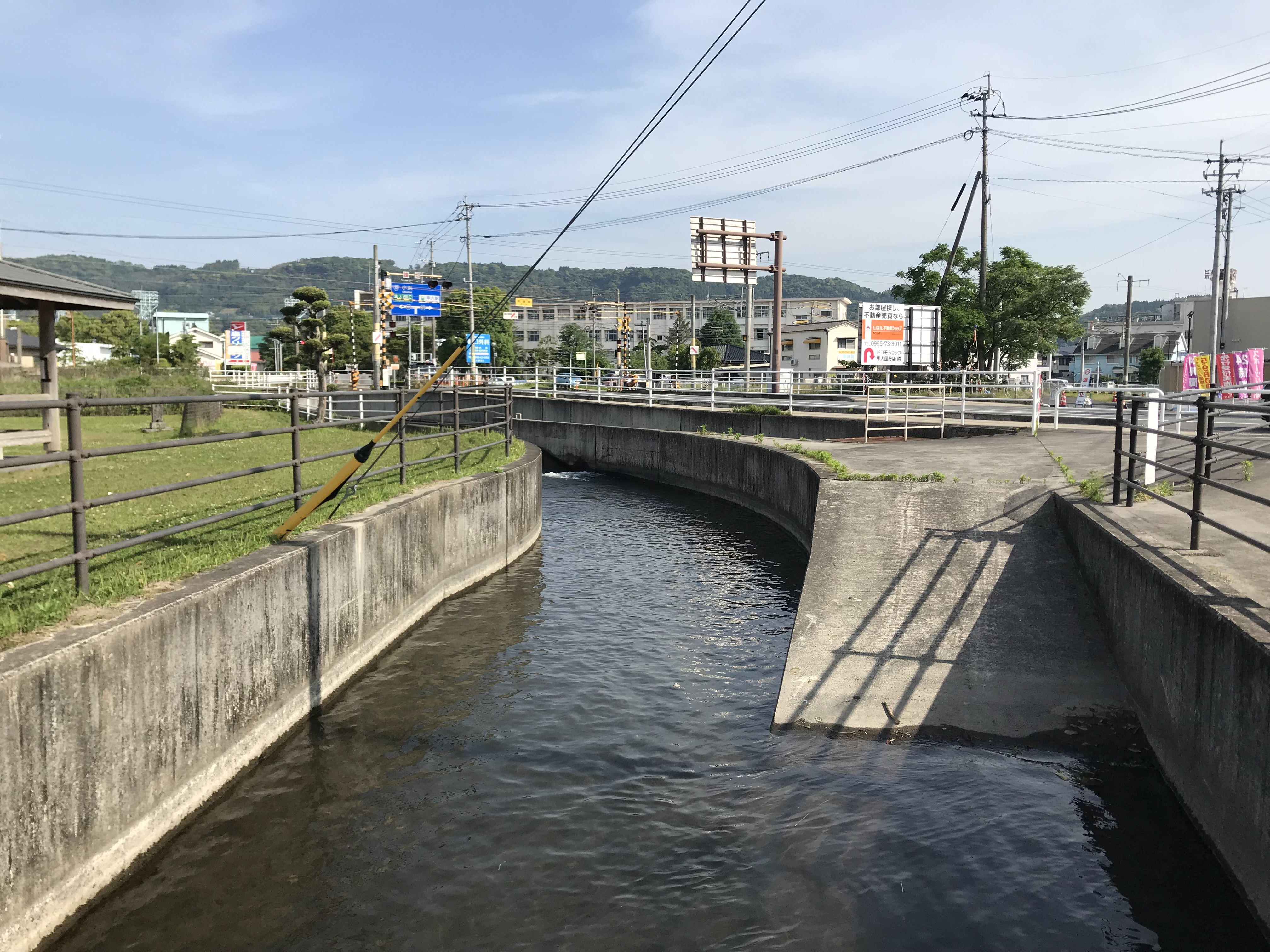 隼人塚前の宮内原用水路